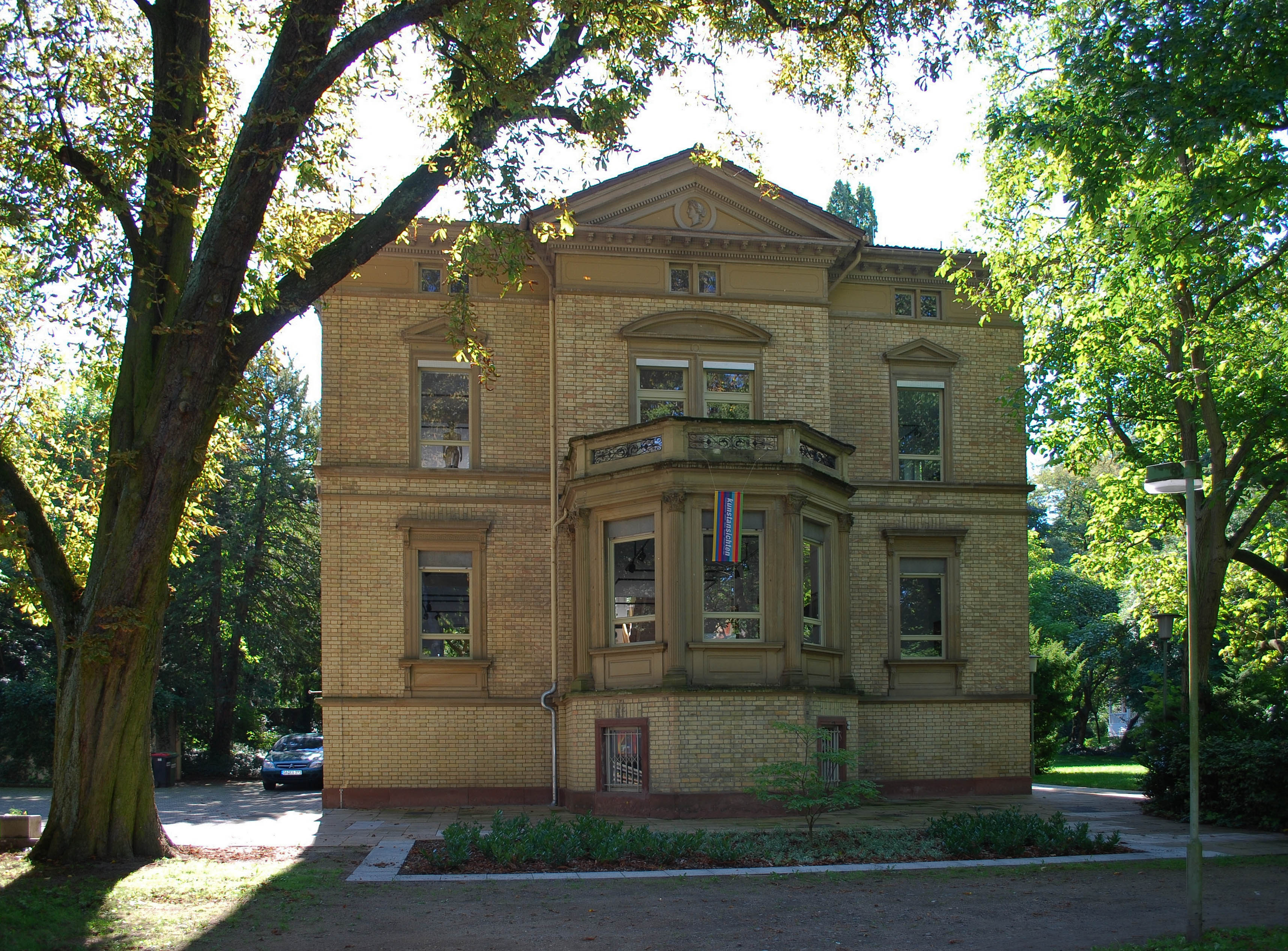 Das Rosenheim-Museum ist das Museum für zeitgenössische Kunst in Offenbach am Main.